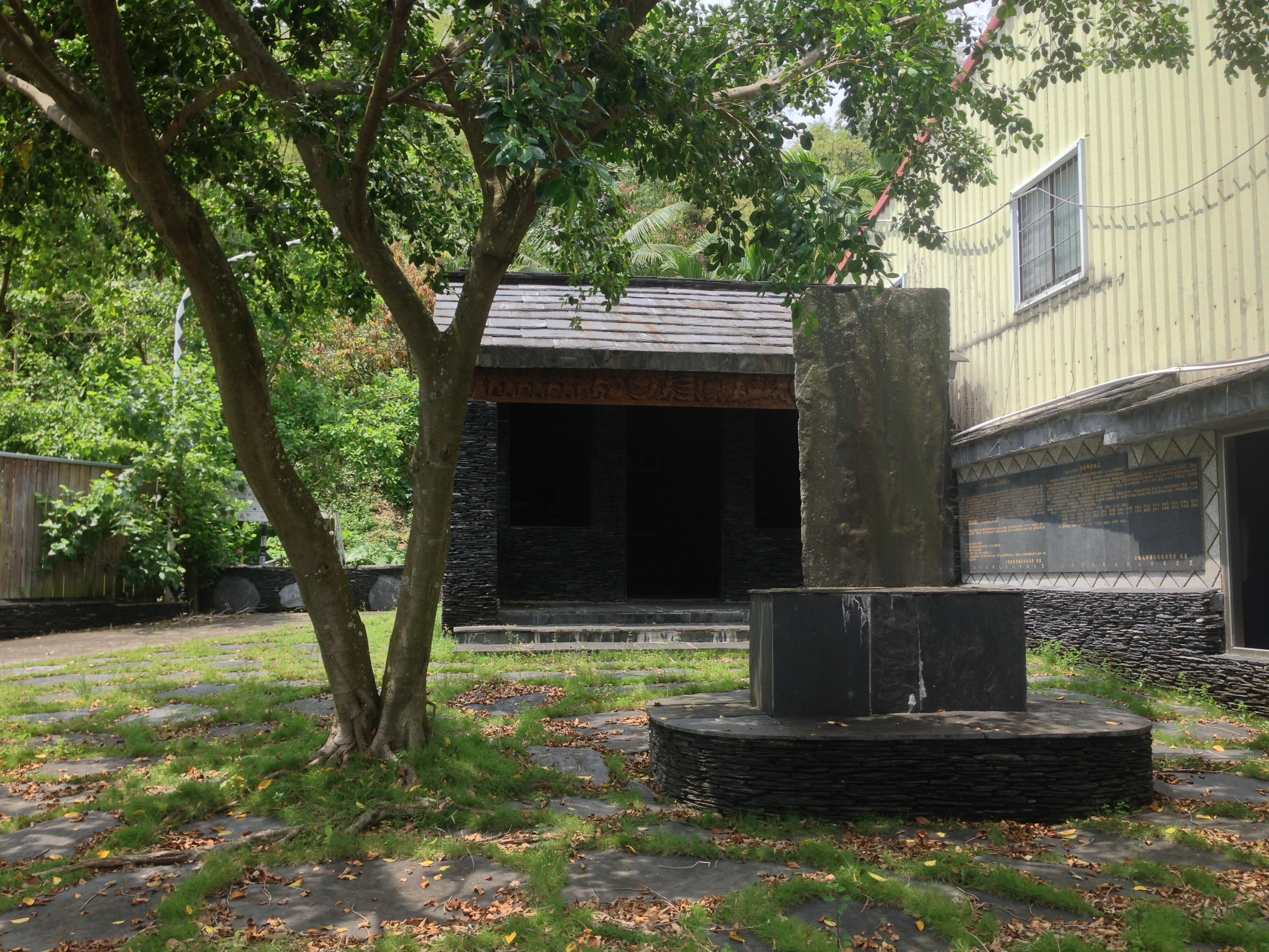 中文（台灣）: 屏東縣來義鄉古樓社區祖靈屋